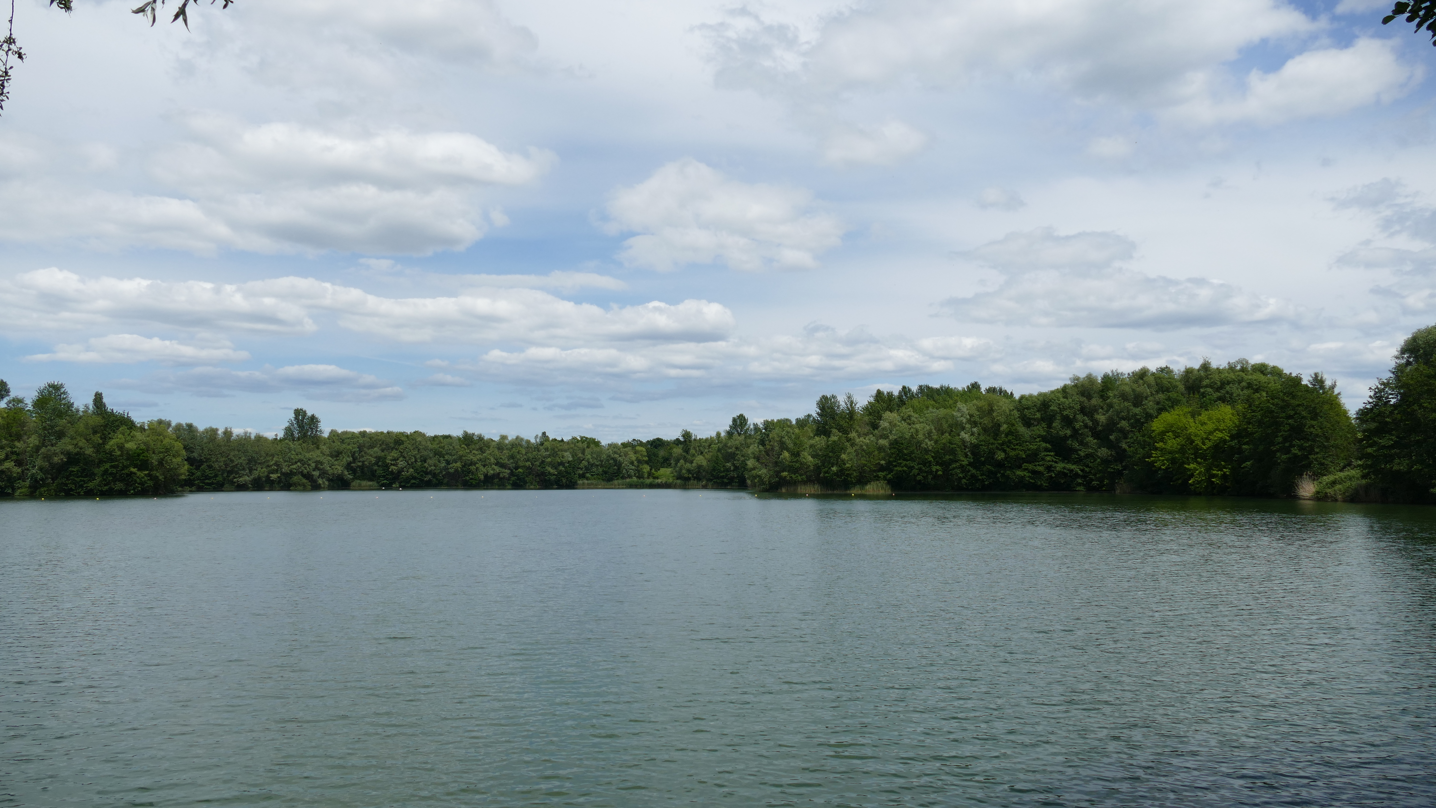 Naturschutzgebiet Rumpenheimer und Bürgeler Kiesgruben in Offenbach Schultheisweiher, die geschützte Ostseite